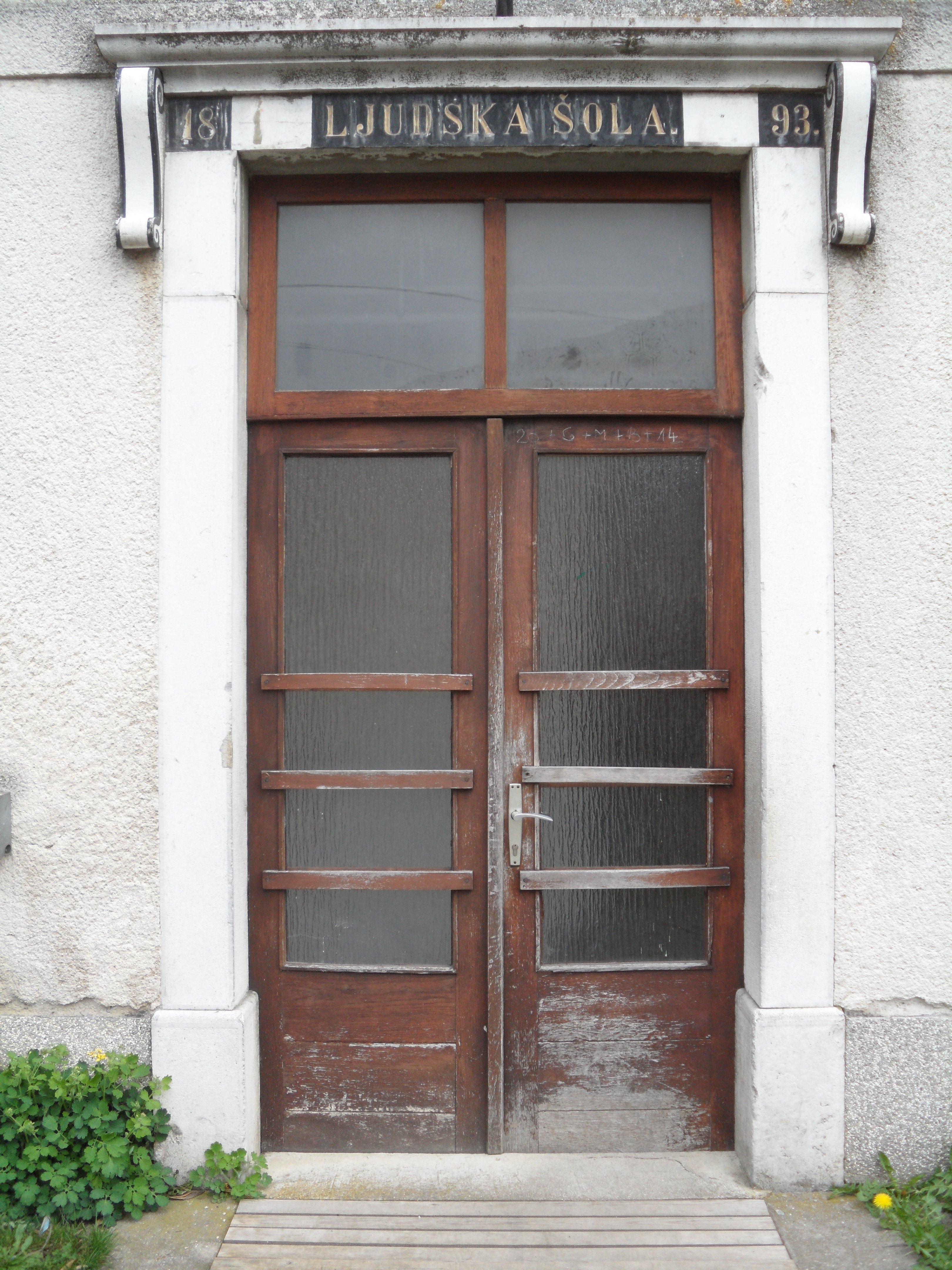 Ljudska šola 1893, Grahovo, Cerknica